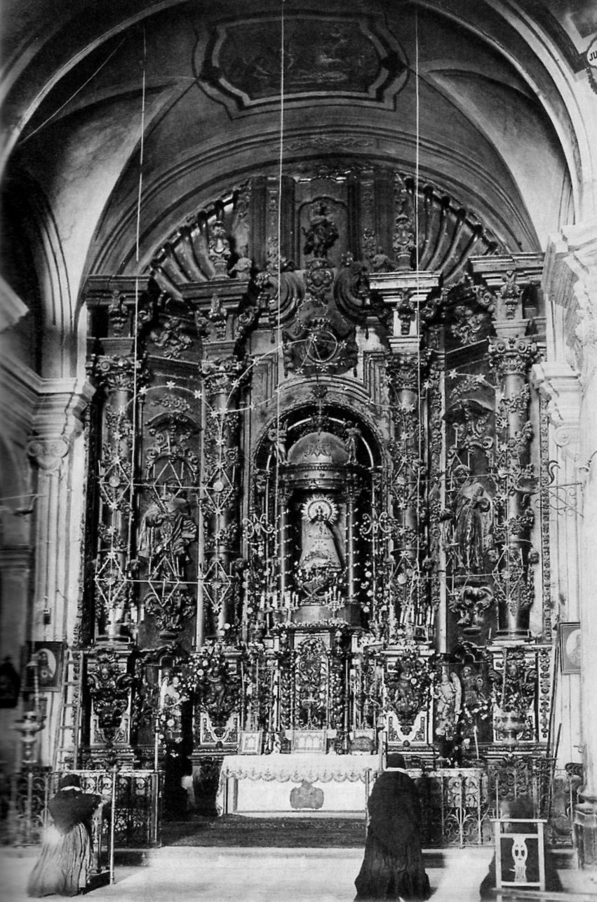 Templo del Pilar (Calanda) - Altar Mayor (destruido durante la Guerra Civil Española 1936-39)